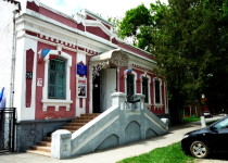 Историко-краеведческий музей в Славянске-на-Кубани, Краснодарский край, Россия